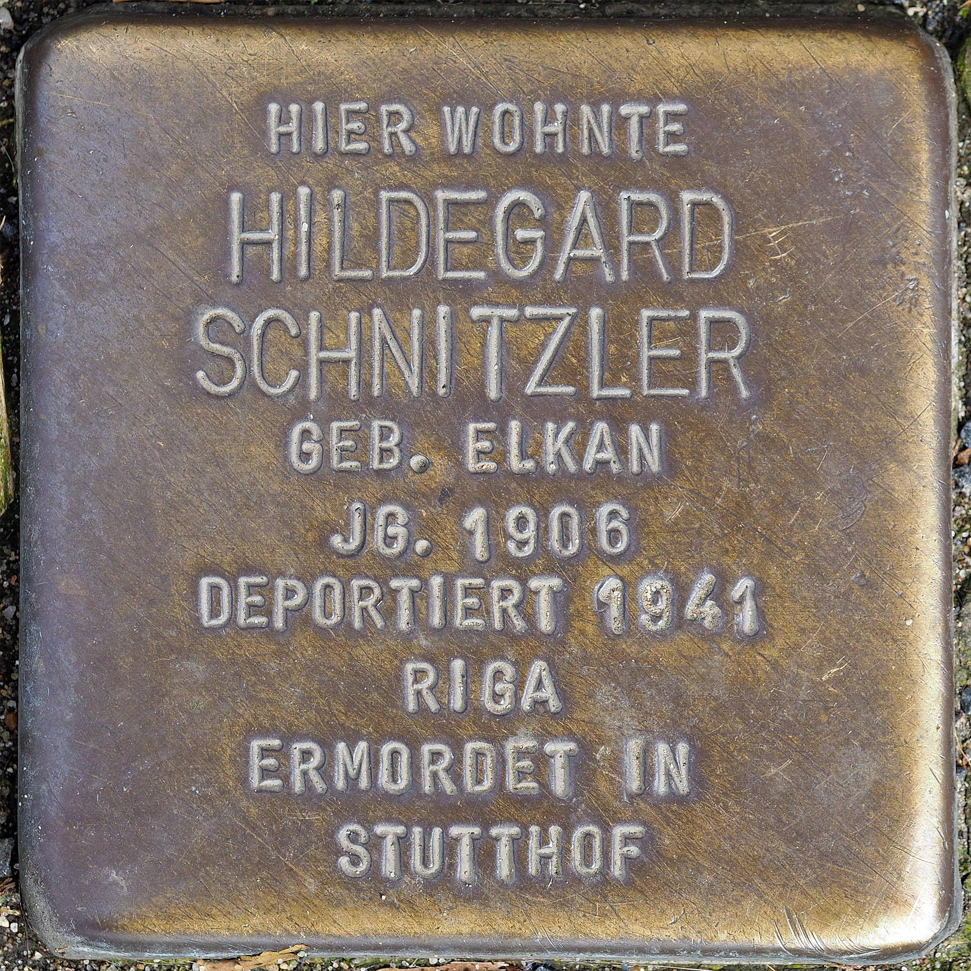 Stolpersteine MG: Schnitzler, Hildegard